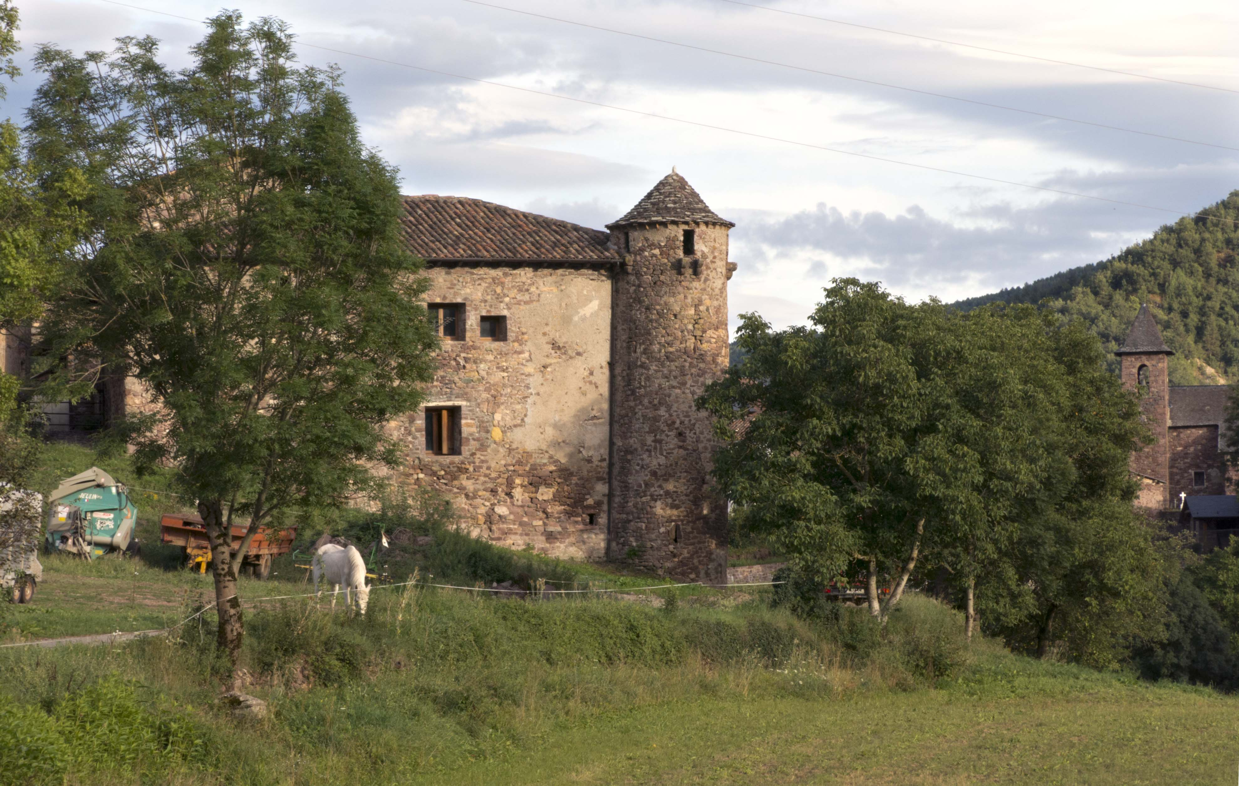 Casa amb torre circular, situada a Noals (terme de Montanui) i a l'esquerra de la Valira de Castanesa, comarca aragonesa de la Ribagorça.